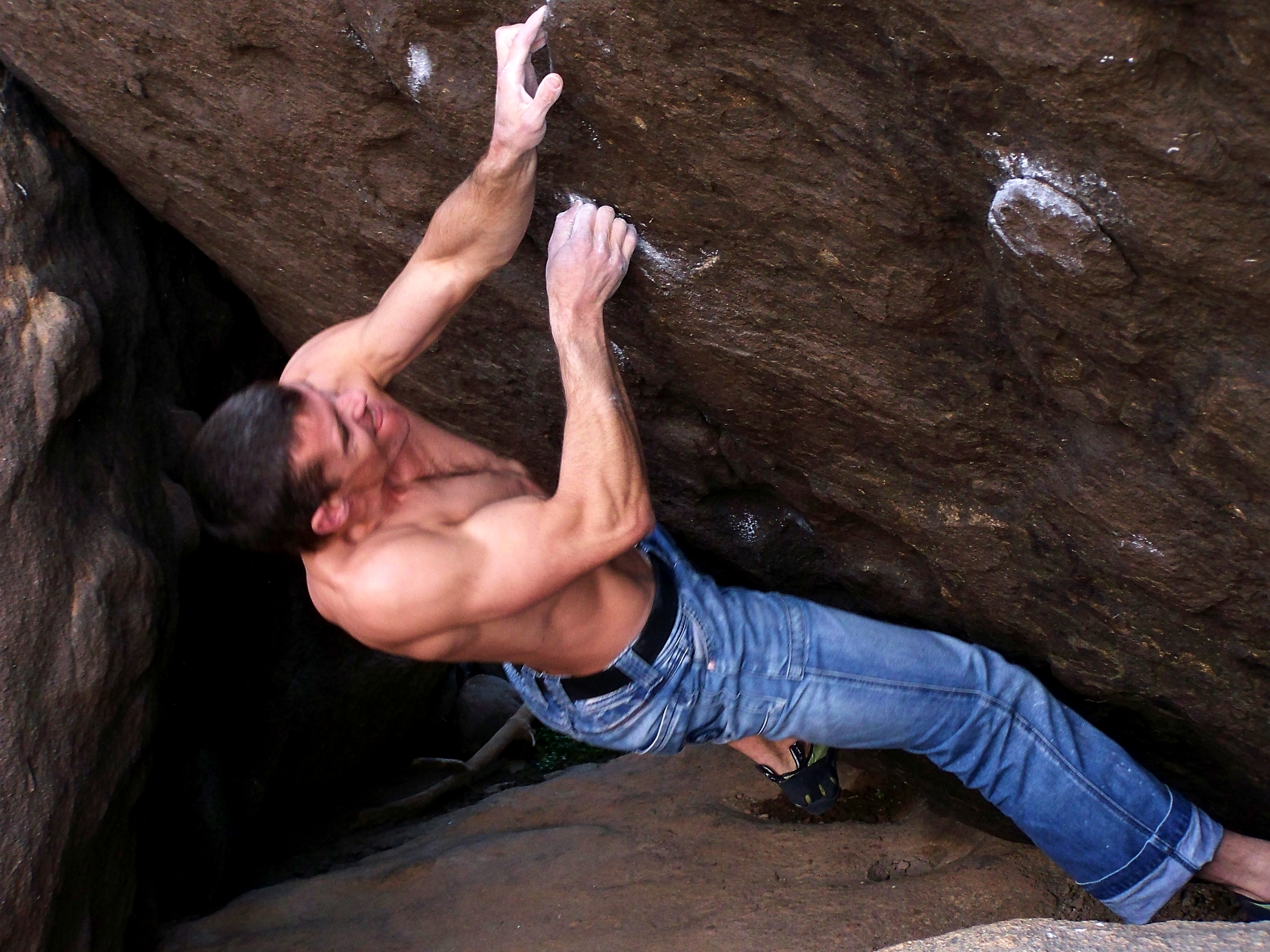 ben en via galia.